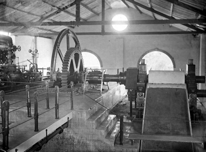 Negatief. Interieur van een suikerfabriek, Probolinggo, Oost-Java